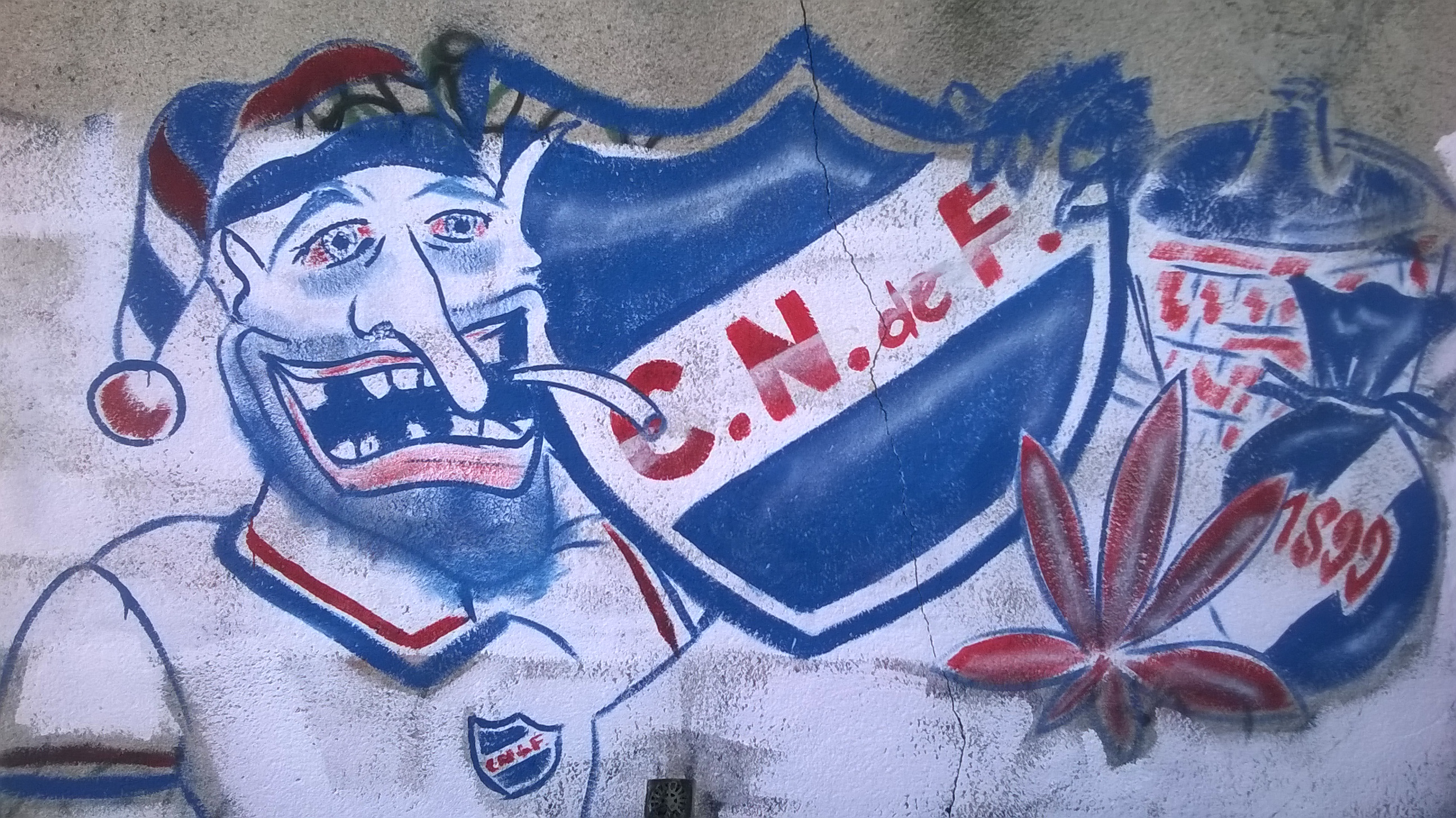 Graffiti de Nacional